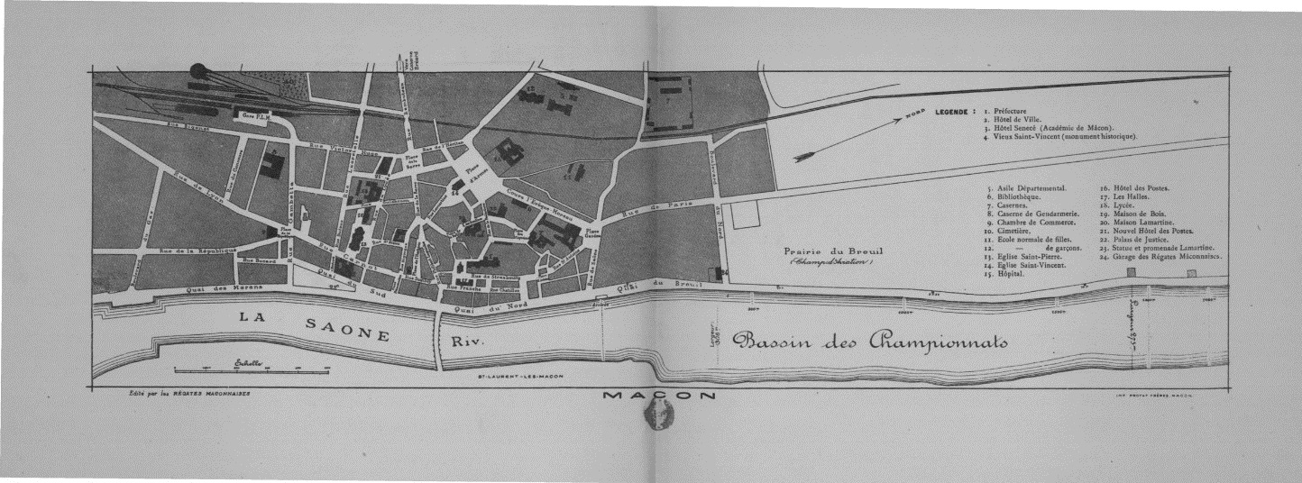 Les championnats d'aviron : sud-est-France-Europe, à Mâcon : 8, 13 et 15 août 1920